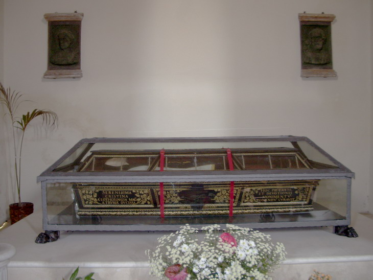 Cappella sinistra Pieve di San Martino a Batignano (GR)